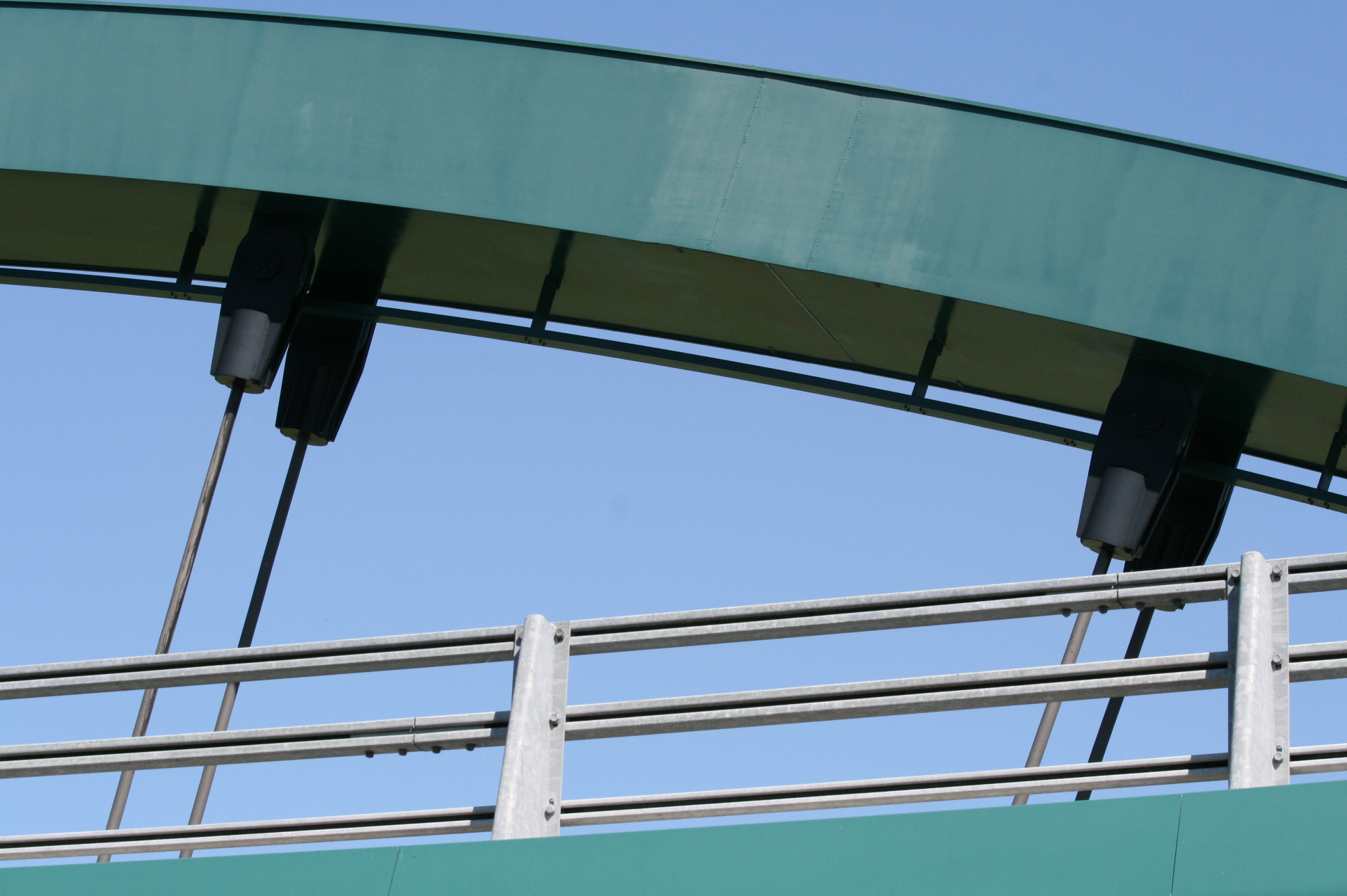 Viaduc de Pannes – pont en arc bowstring et ouvrage d’accès en bipoutre métallique. Franchit le Canal d’Orléans et la Bézonde – Département du Loiret (France)